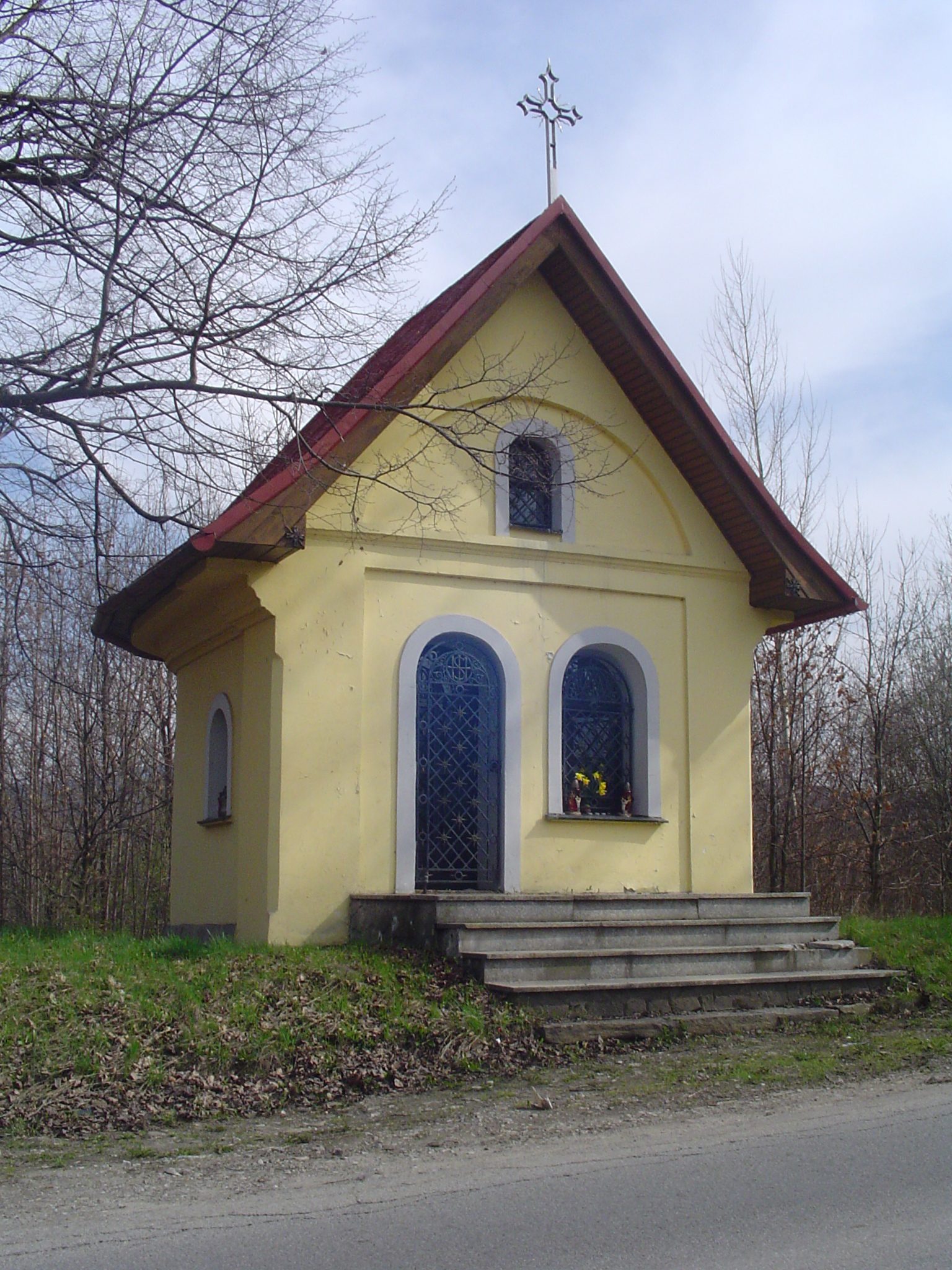 Kapliczka "na Foksowej Kępie" w Radziechowach przy drodze DK69 relacji Żywiec-Zwardoń